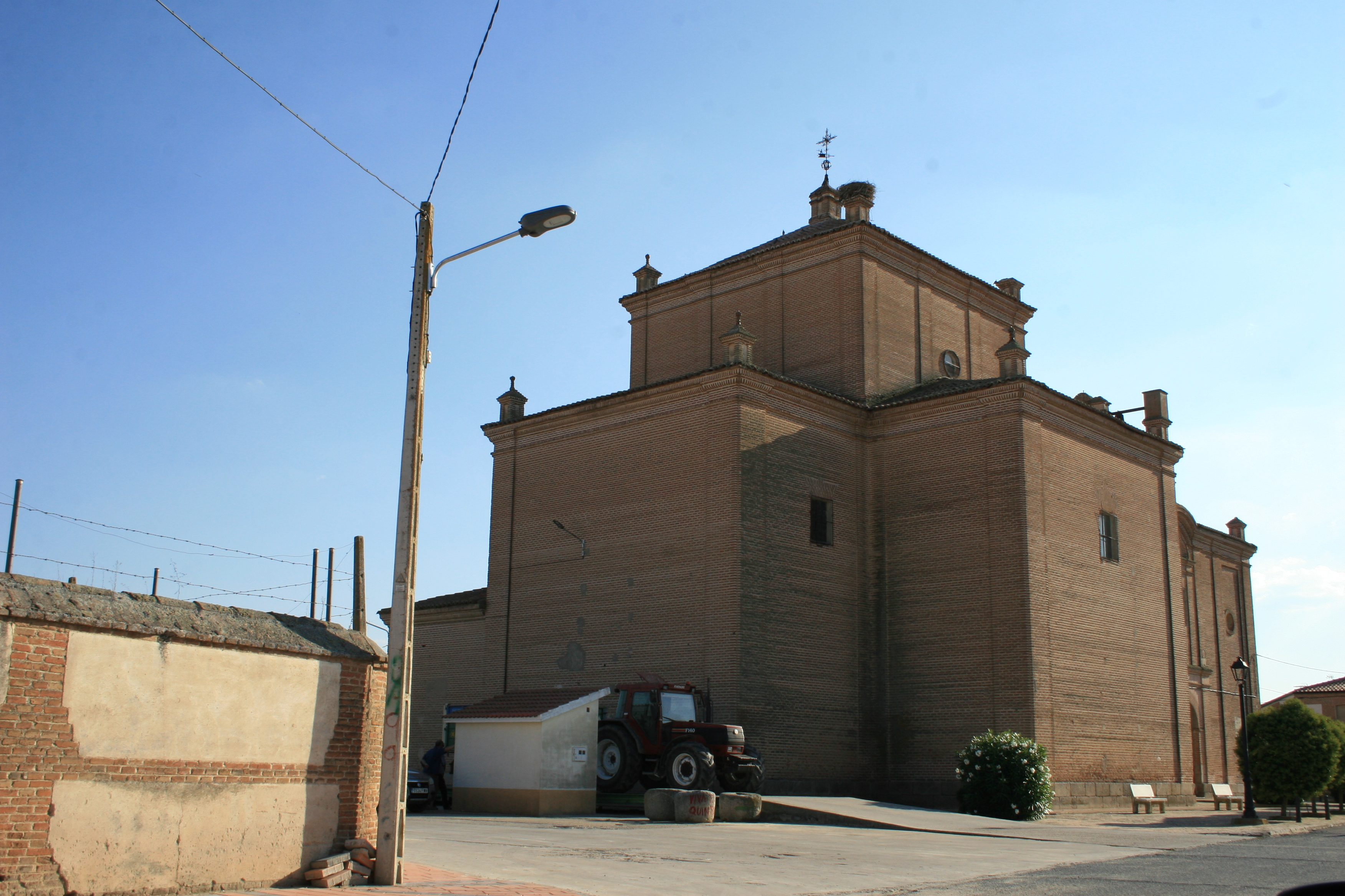 Mamblas